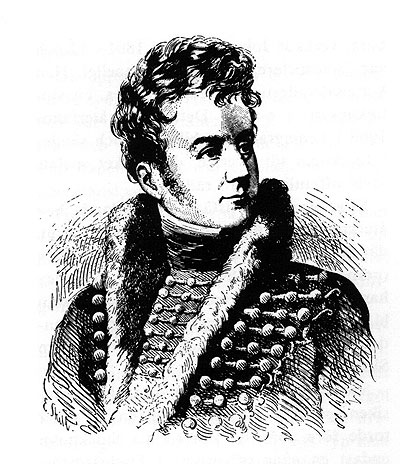 Edouard Du Puy